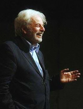 Yo, Ana Melania Bolívar González, propietaria del copyright de la mencionada imágen en su email, y que se encuentra en otorgo permiso para copiar, distribuir y/o modificar este documento bajo los términos de la GNU Free Documentation License, Versión 1.2 u otra versión posterior, publicada por la Free Software Foundation; bajo la licencia GFDL, sujeto a las clausulas que se hallan en Por favor acreditar la foto: © Ana Bolívar ( A copy of email permission was sent to mailto: A new copy of email permission was sent to mailto: on october 29 2007